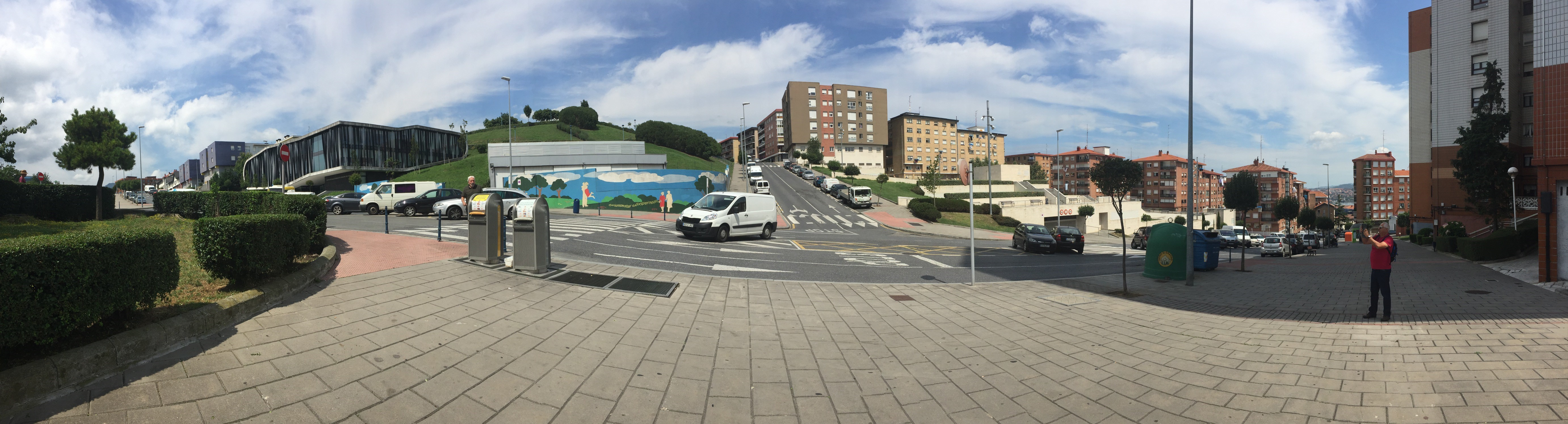 המערכת הפניאומטית לאיסוף ושינוע אשפה עירונית בפורטוגלטה, ברצלונה